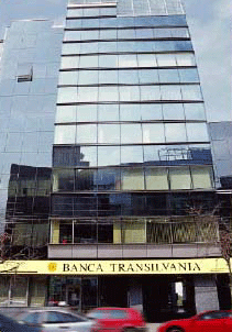 Sediul Central al "Băncii Transilvania", Cluj-Napoca